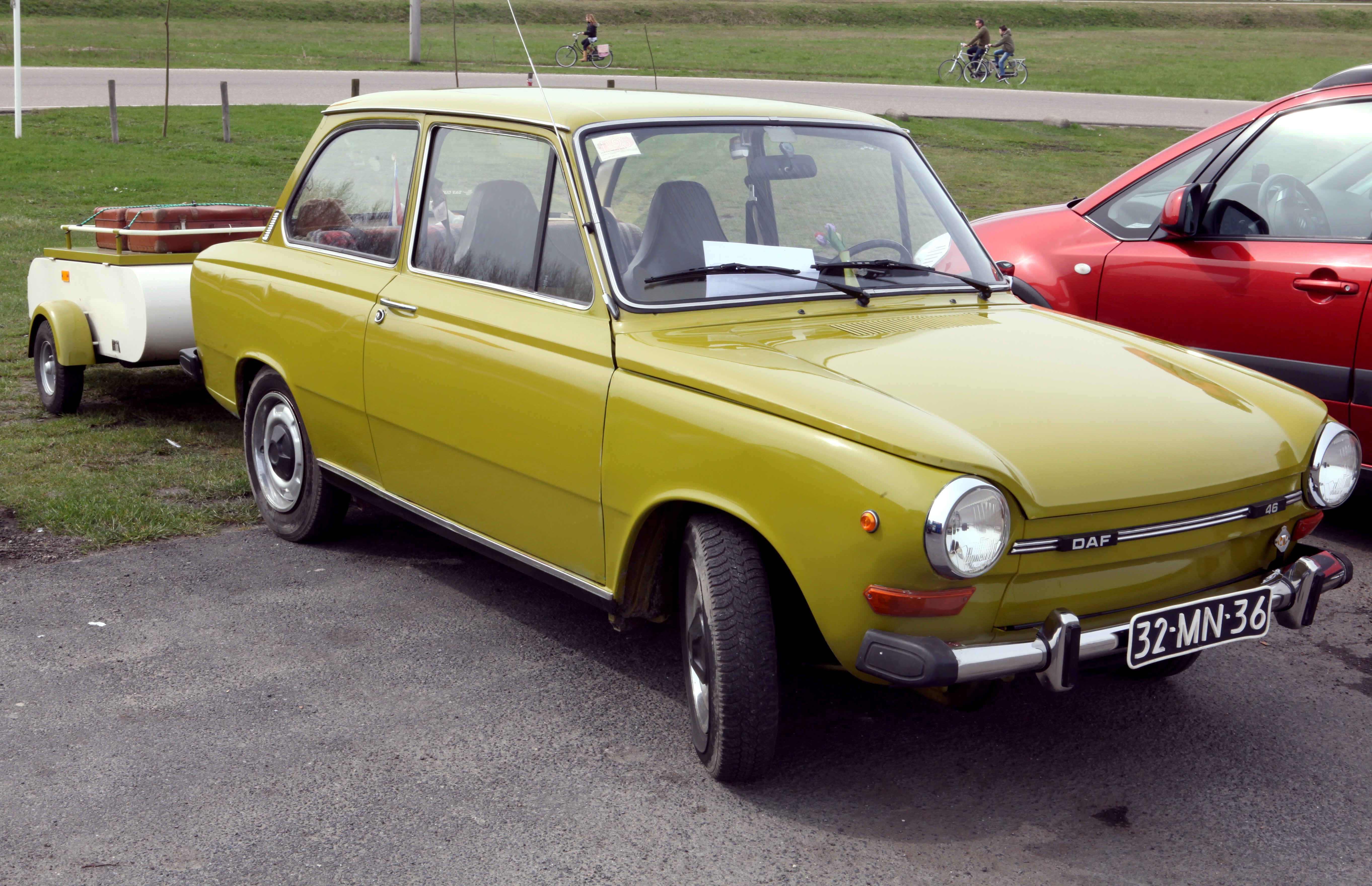 Daf 46